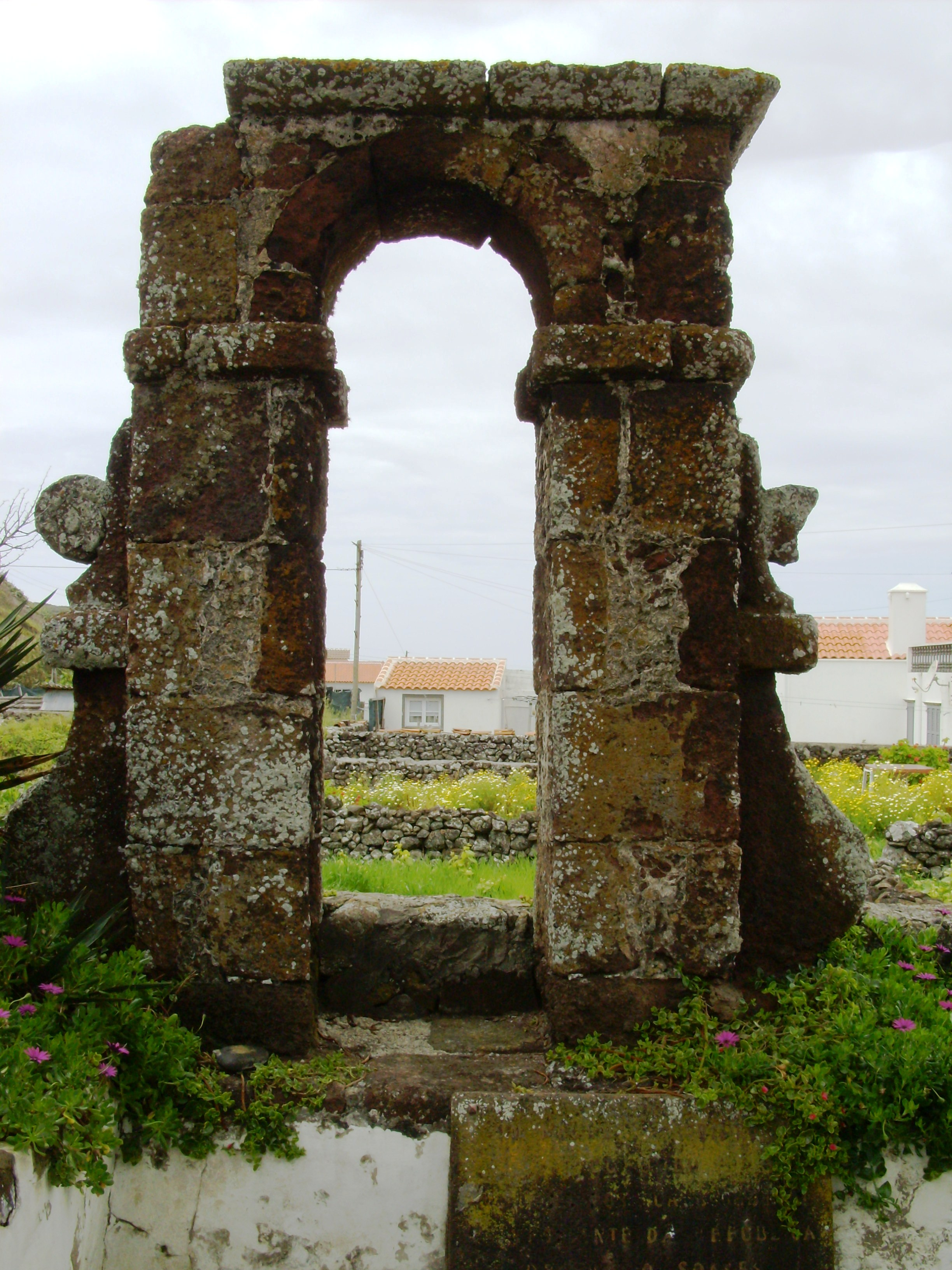 Ermida de Nossa Senhora dos Anjos, feeguesia e concelho de Vila do Porto, ilha de Santa Maria, Açores.